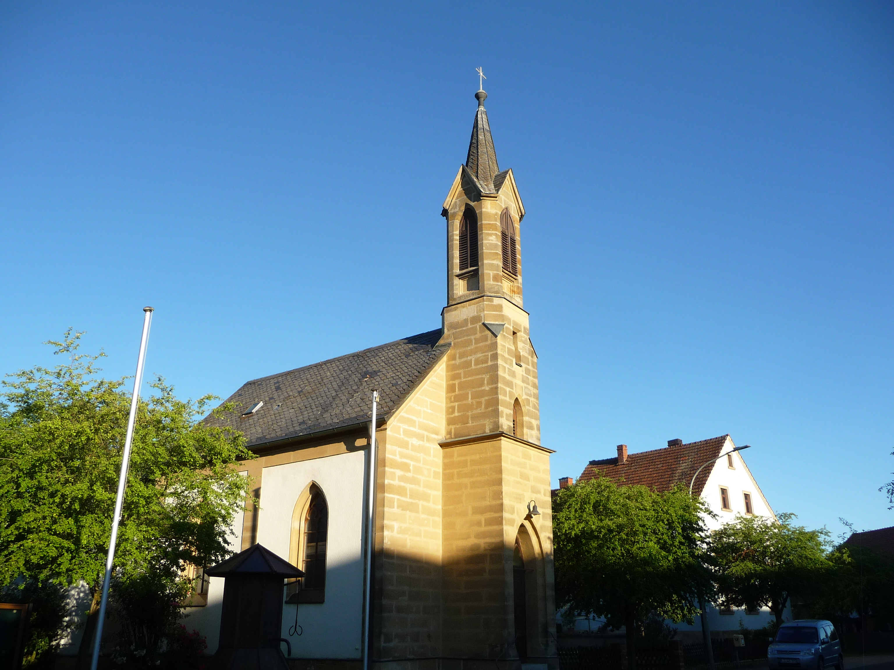 Laubend ist ein Ortsteil der Gemeinde Memmelsdorf im Landkreis Bamberg mit 166 Einwohnern.